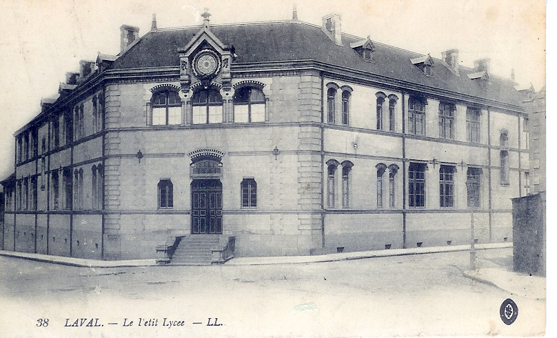 Bâtiment d'origine du collège de jeunes filles de Laval, construit en 1885 par Léopold Ridel